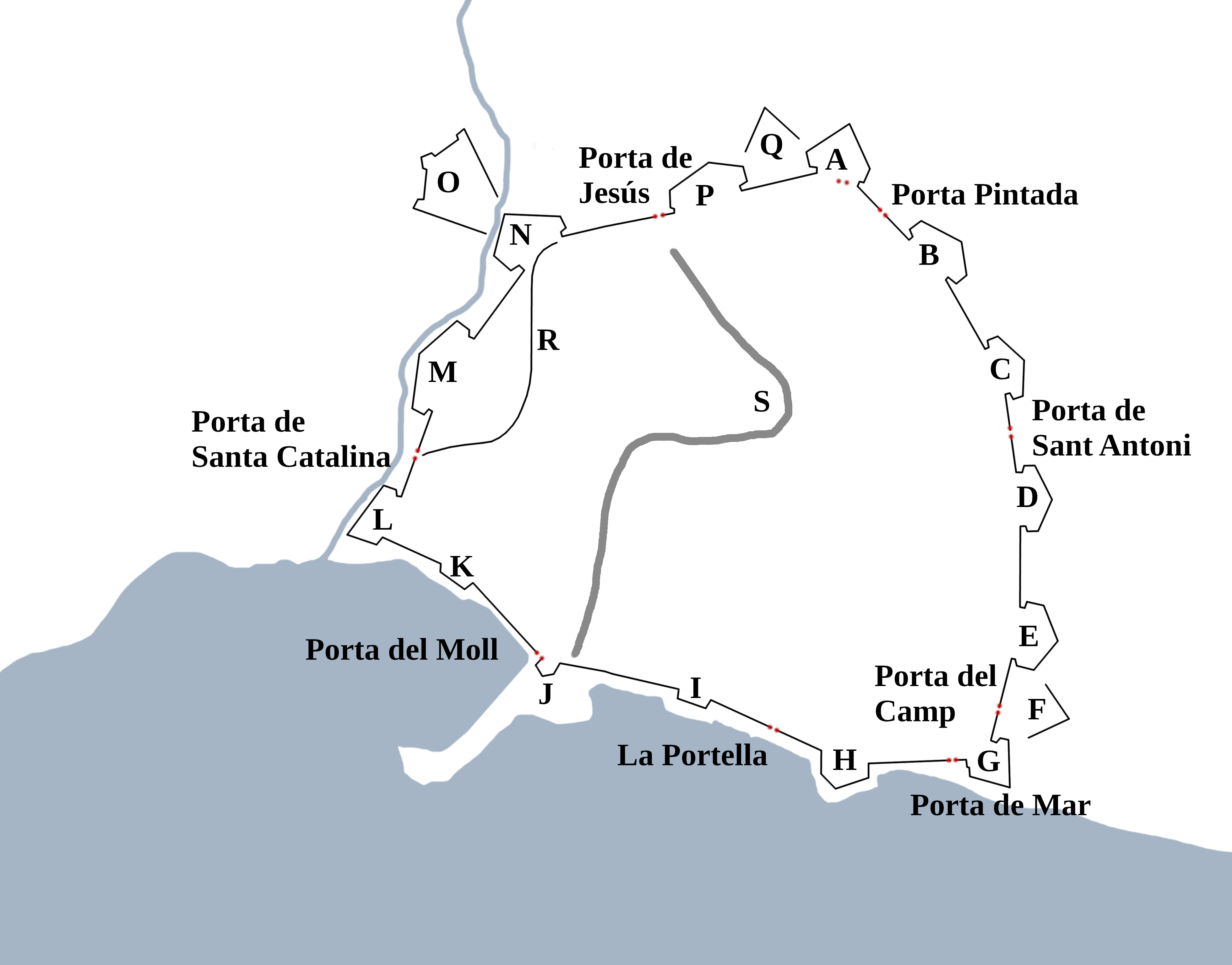 A: Bastió de Santa Margalida i porta de Santa Margalida (es tracta de la porta de la murada medieval, que no s'enderrocà quan es bastiren les noves murades pel simbolisme que portava) B: Bastió d'en Sanoguera C: Bastió de Sant Antoni D: Bastió del Socorrador E: Bastió de Sant Jeroni F: Revellí de la Porta del Camp G: Bastió del Príncep H: Bastió d'en Berard I: Les Voltes J: Bastió del Moll K: Bastió d'en Chacón L: Bastió de Sant Pere o de Santa Catalina M: Bastió d'en Moranta N: Bastió del Sitjar O: El Fortí P: Bastió de Jesús Q: Revellí de Sant Ferran R: Bocí de l'antiga murada medieval que no s'esbucà S: Antic llit de la Riera: la Rambla i el passeig del Born Extrec la informació de Bibiloni, Gabriel, Els carrers de Palma, 2012, pp. 19-26